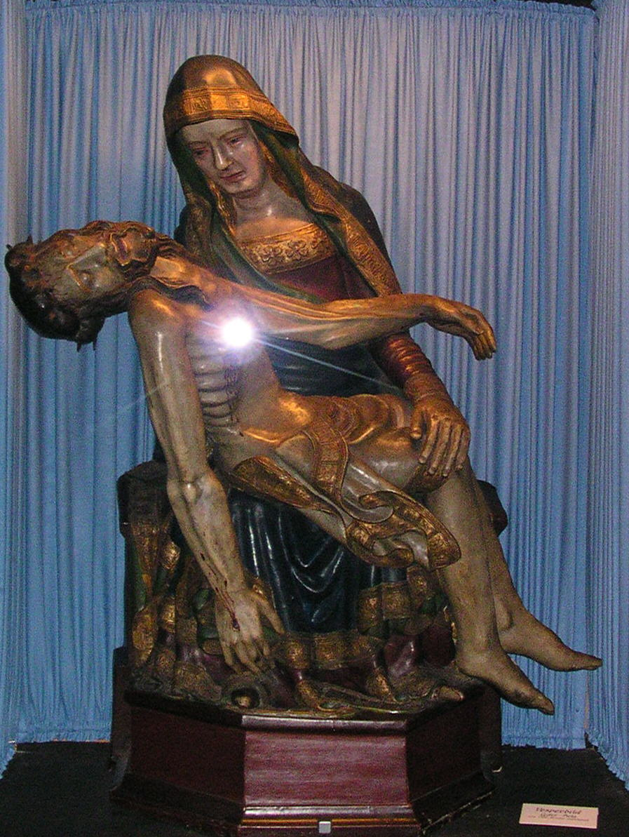 Eschweiler, Lederpietá in der katholischen Kirche Peter und Paul